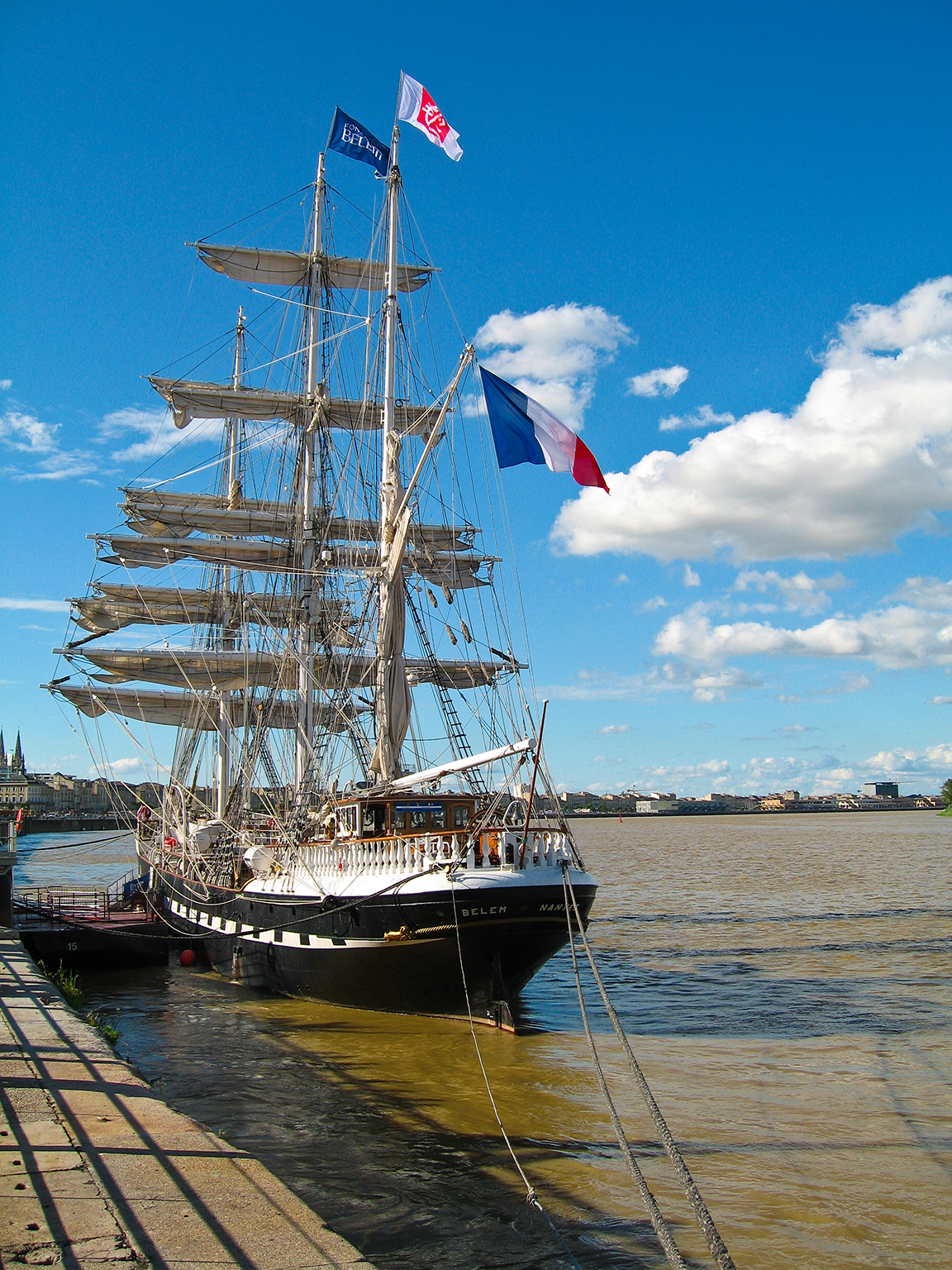 Le Belem, Bordeaux fête le fleuve, Bordeaux, Gironde, France